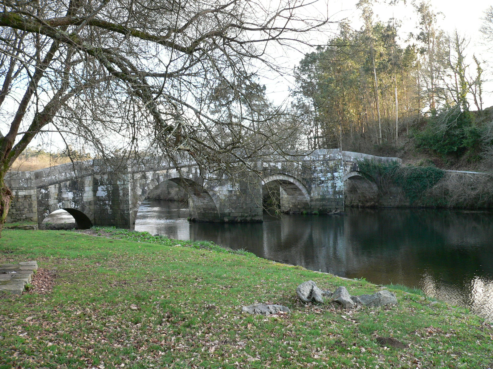 Brandomil (Ponte medieval sobre o Xallas)